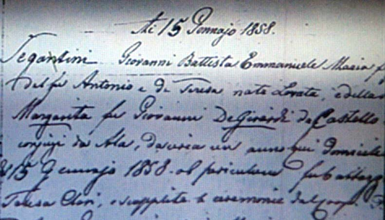 Geburtsurkunde